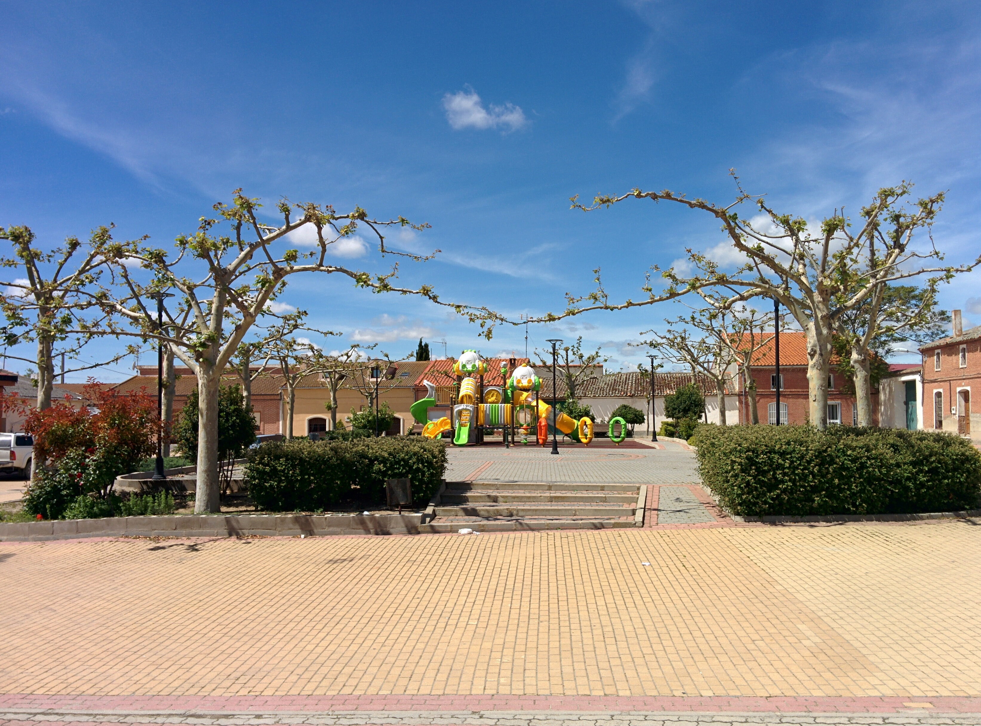 Plaza Mayor de Rubí de Bracamonte (Valladolid, España).